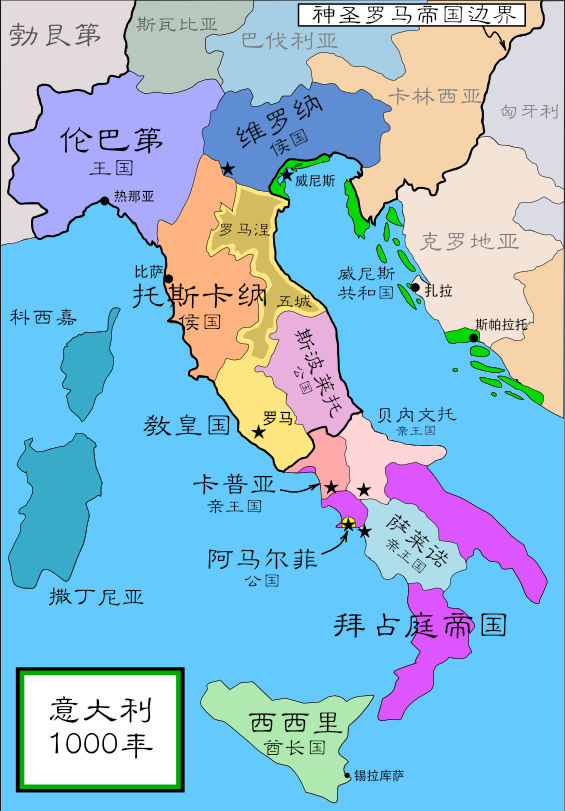 中文（中国大陆）: 1000年的意大利